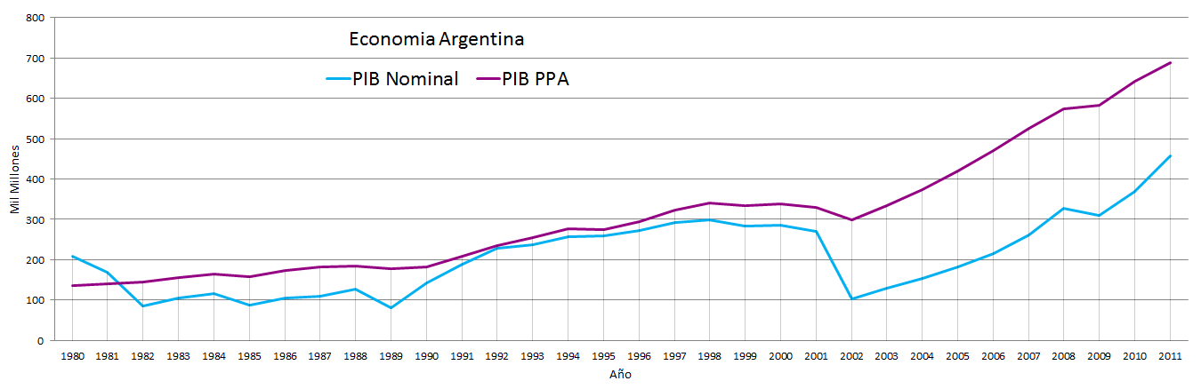 Trayectoria de la economía Argentina